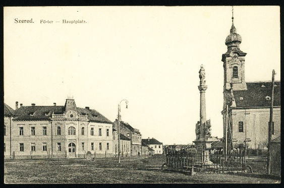 Moja pohladnica